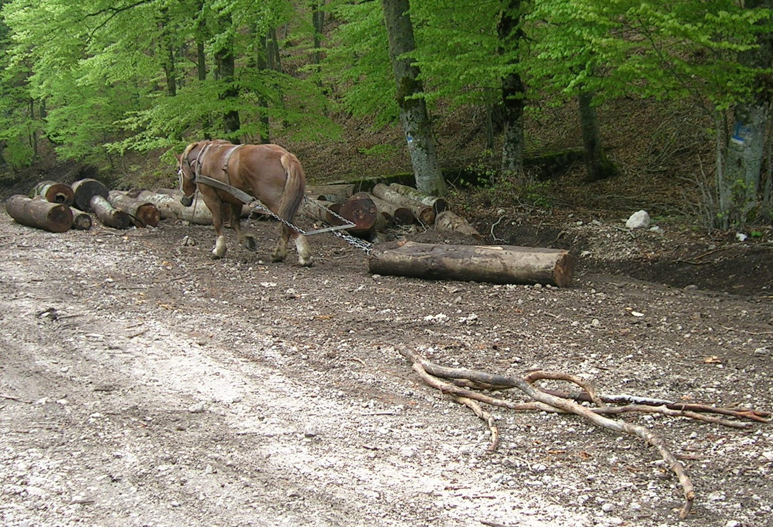 nel Vallone Peschio di Iorio